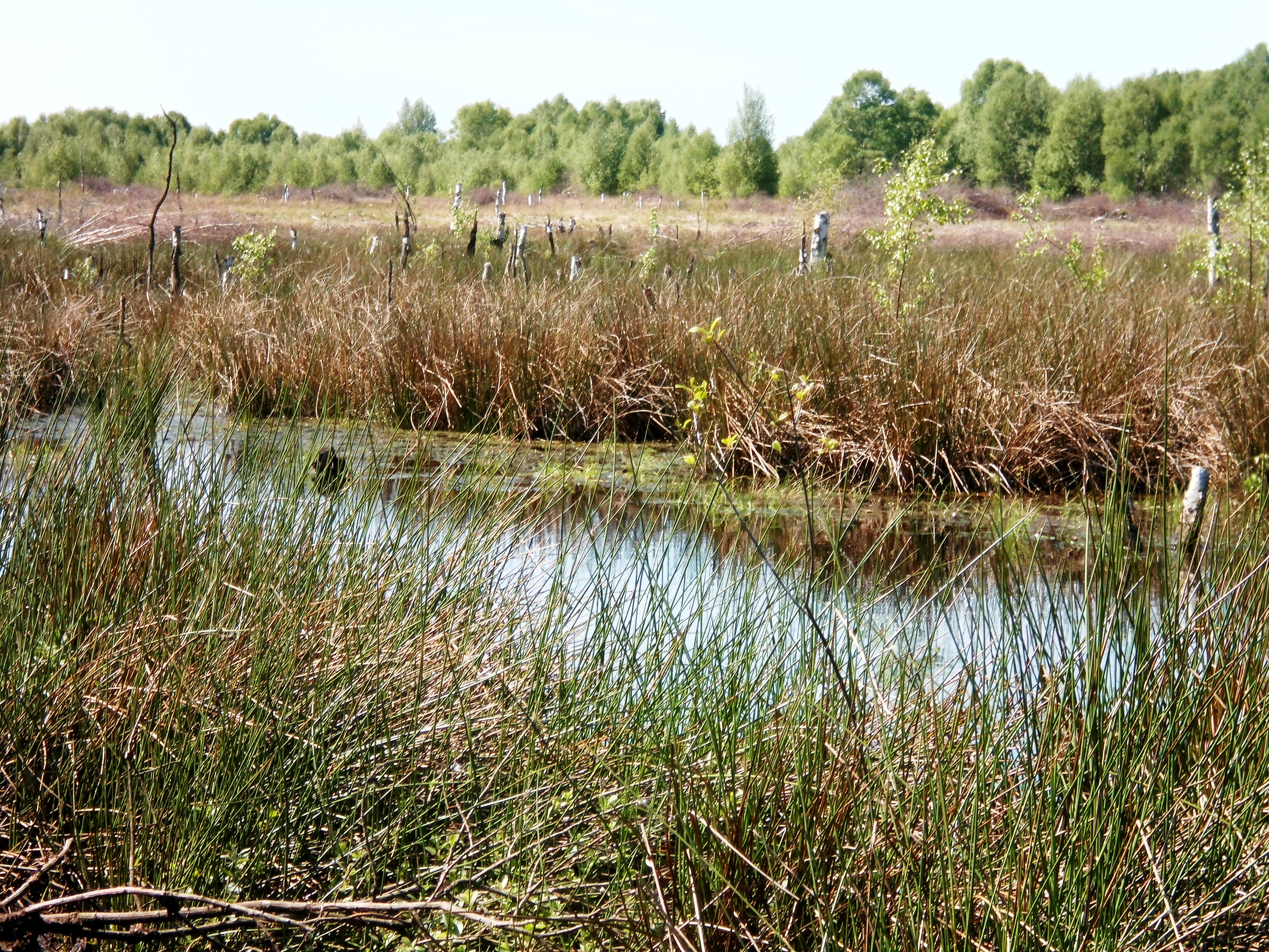 Wiedervernässung des Hochmoores am Moorerlebnispfad im Diepholzer Moor (NSG HA 148) westlich von Diepholz, Niedersachsen